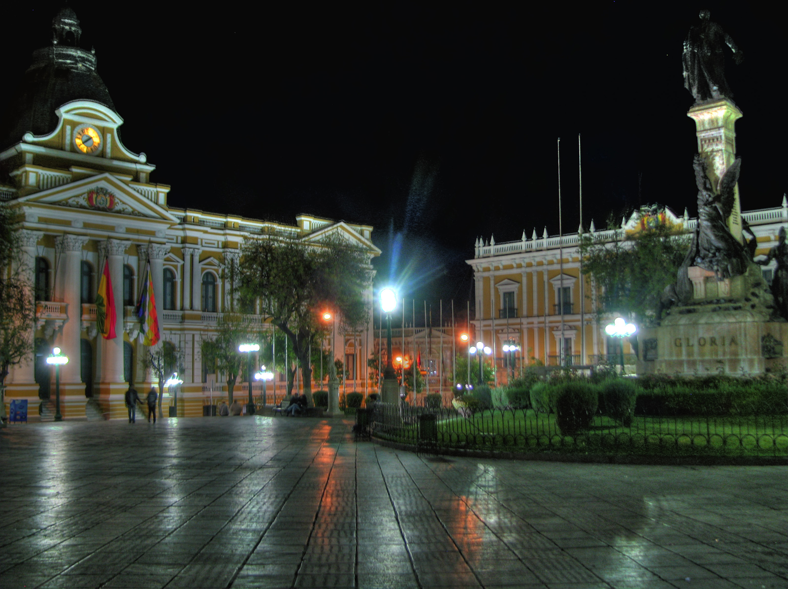 Palacio de Gobierno, Palacio Quemado This medium shows the protected monument with the number L/00-078 in Bolivia.